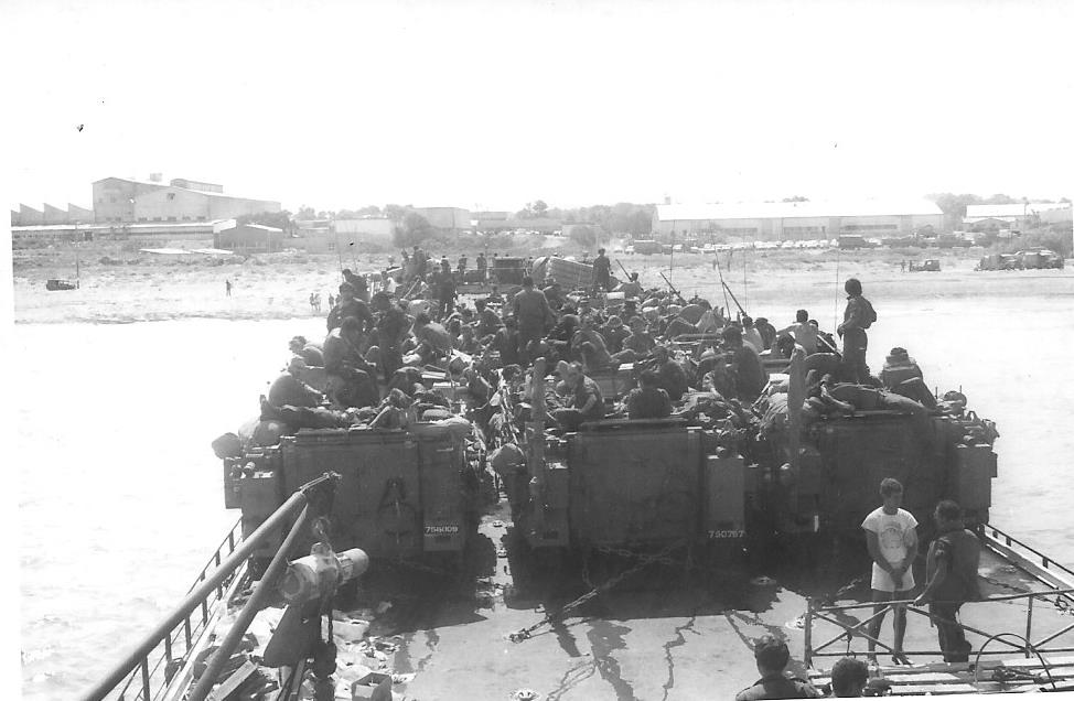 העלאת זחל"מים לסיפון אח"י בת שבע בחוף נהריה